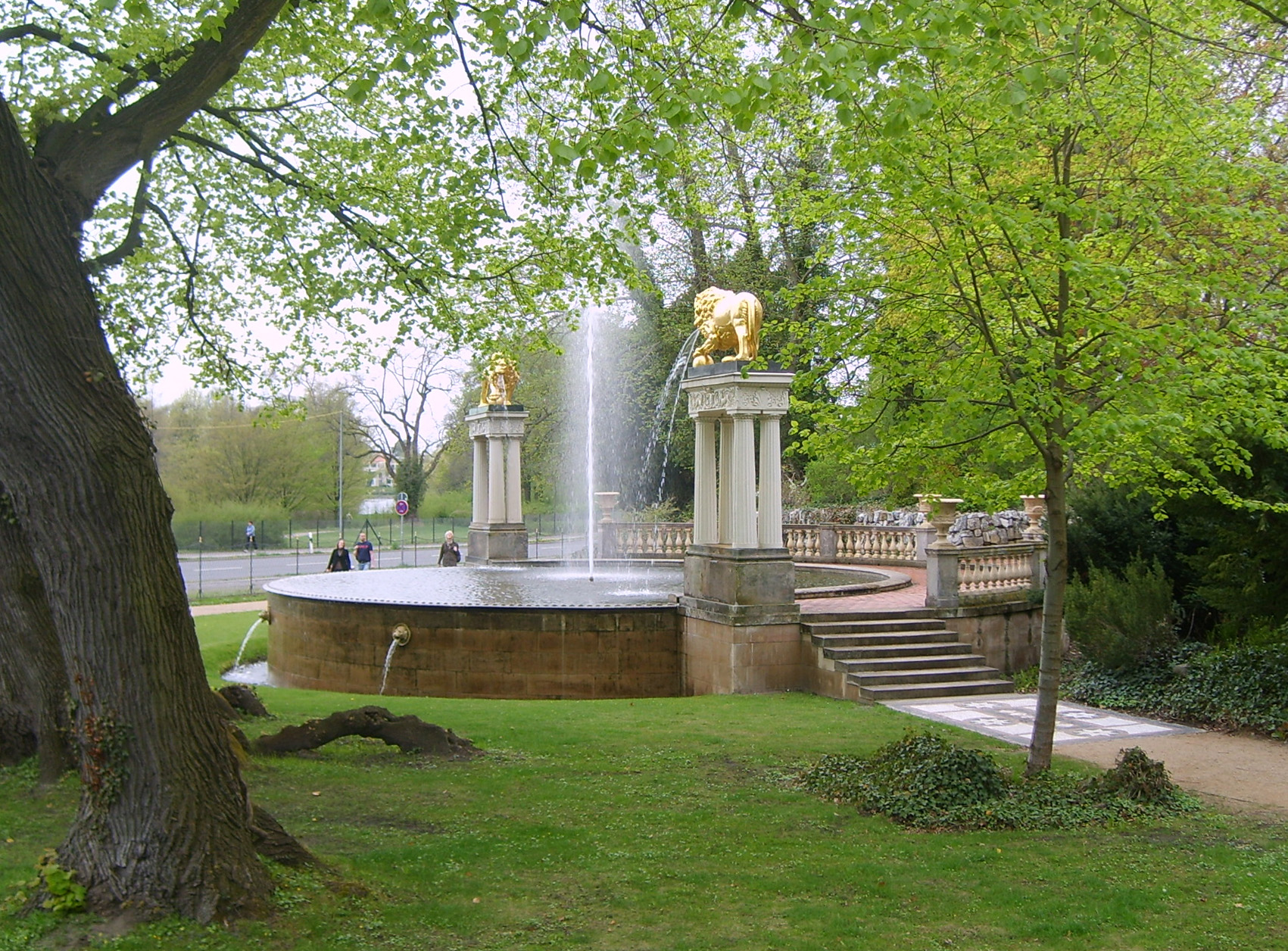 Löwenfontaine vom Stibadium, Glienicker Park, 1.5.2013